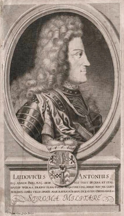 Ludwig Anton von Pfalz-Neuburg (1660-1694), Bischof von Worms, Hochmeister Deutscher Orden